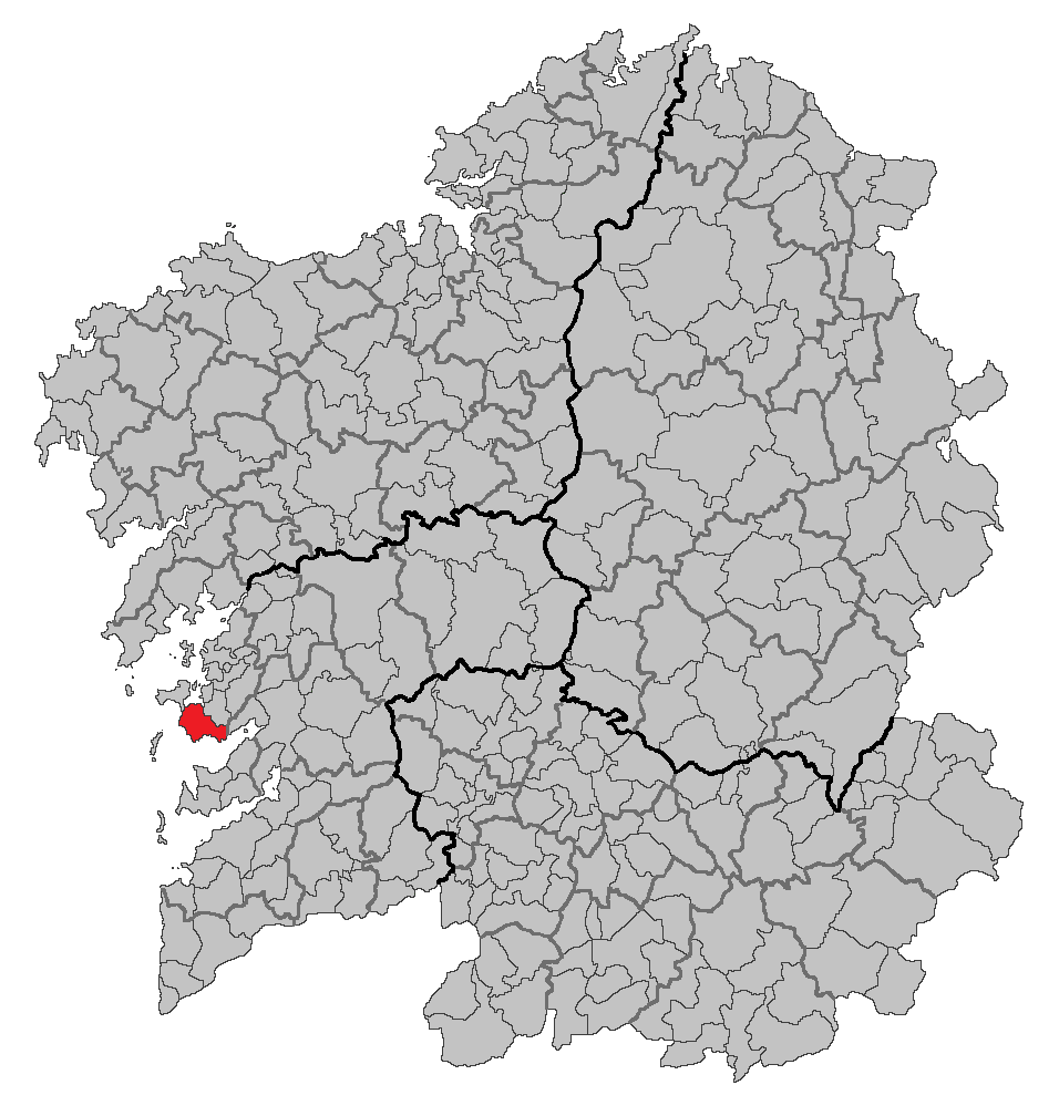 Mapa coa localización do concello de Sanxenxo.